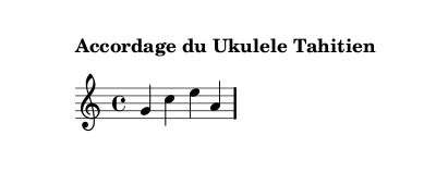 accord pour chacun des chœurs du ukulélé tahitien de haut en bas, du quatrième au premier chœur.